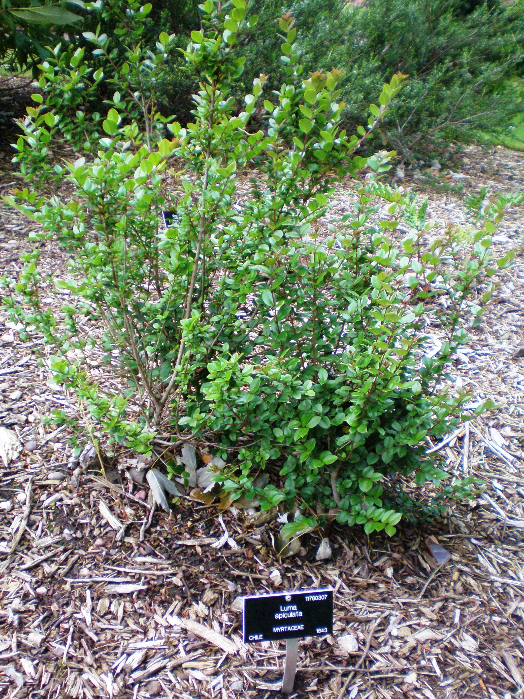 Little tree Luma apiculata